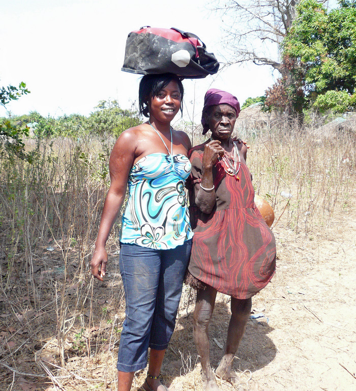 getting supplies from uite village